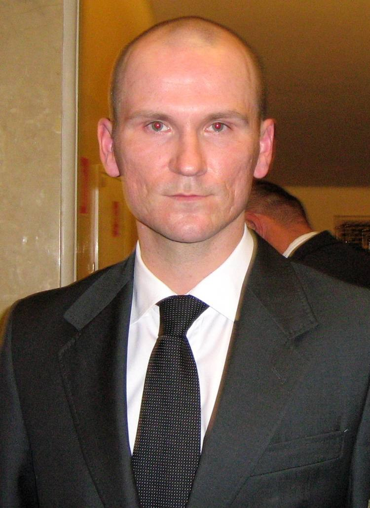 Tomasz Wojciech Lipiec (ur. 10 maja 1971 w Warszawie) - polski chodziarz, dziennikarz i polityk